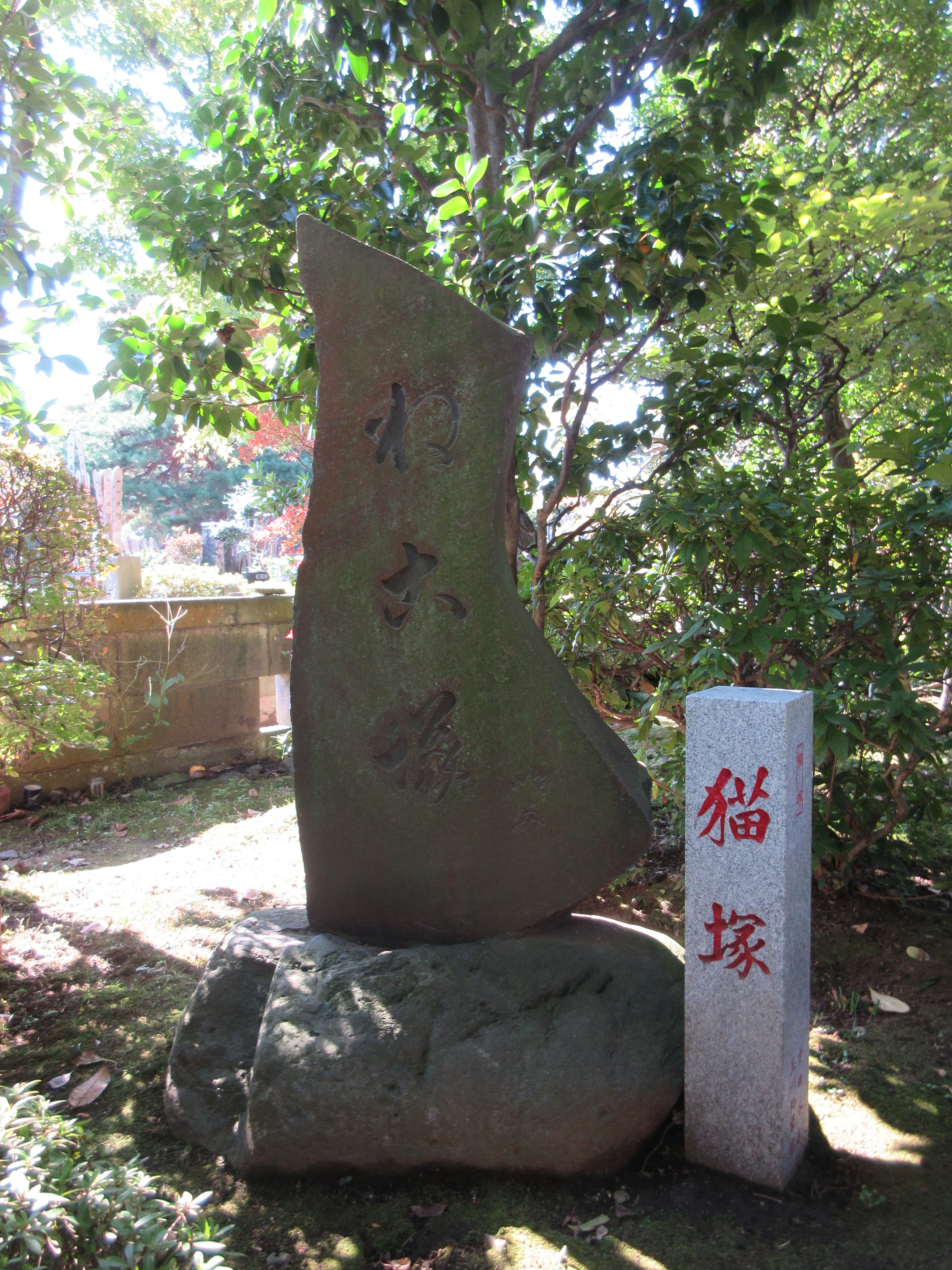 行善寺内の猫塚の画像